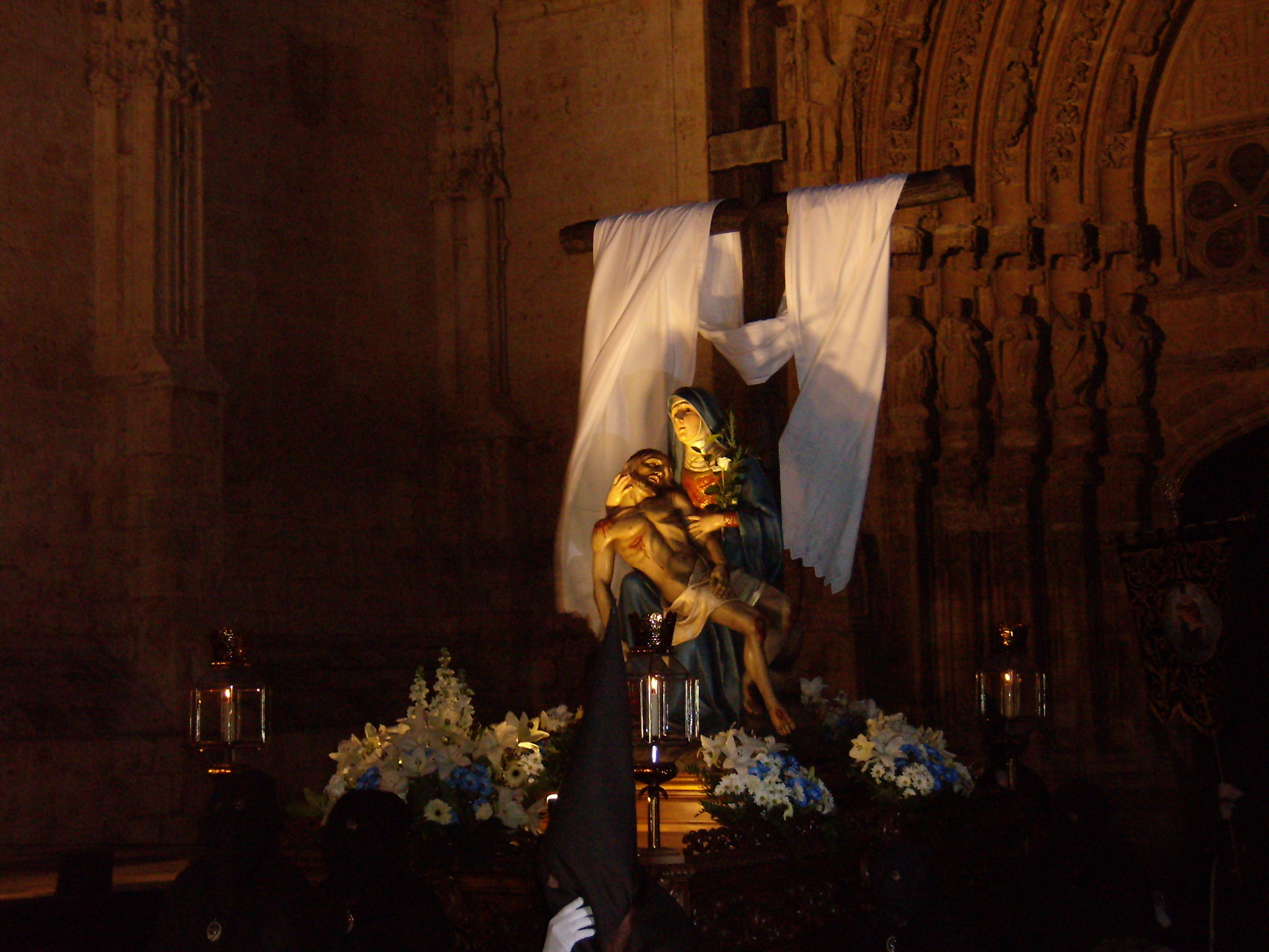 Virgen de la Piedad, Hermanos Martínez (2004). Semana Santa de Palencia.